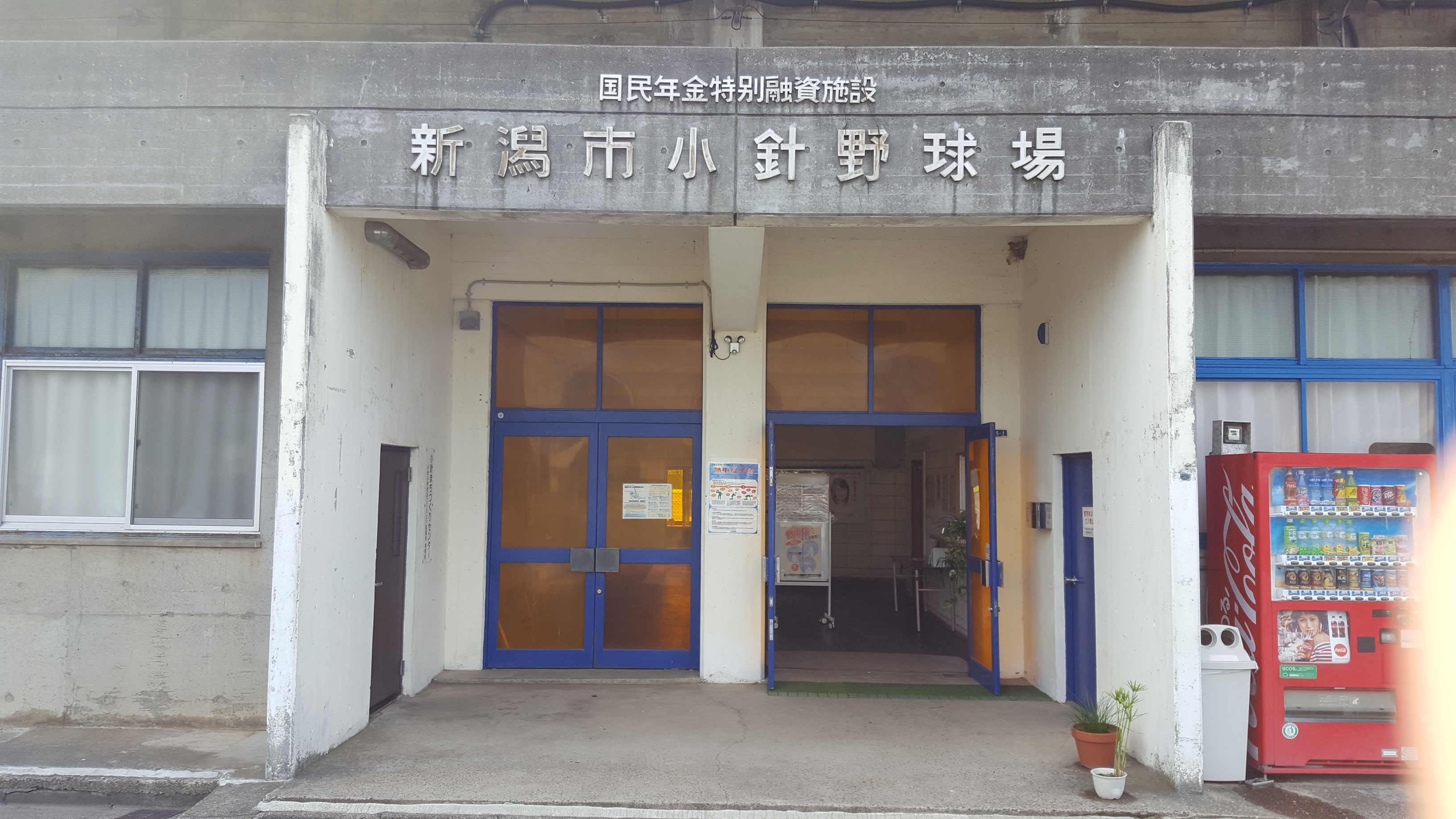 新潟市小針野球場（2017年7月）